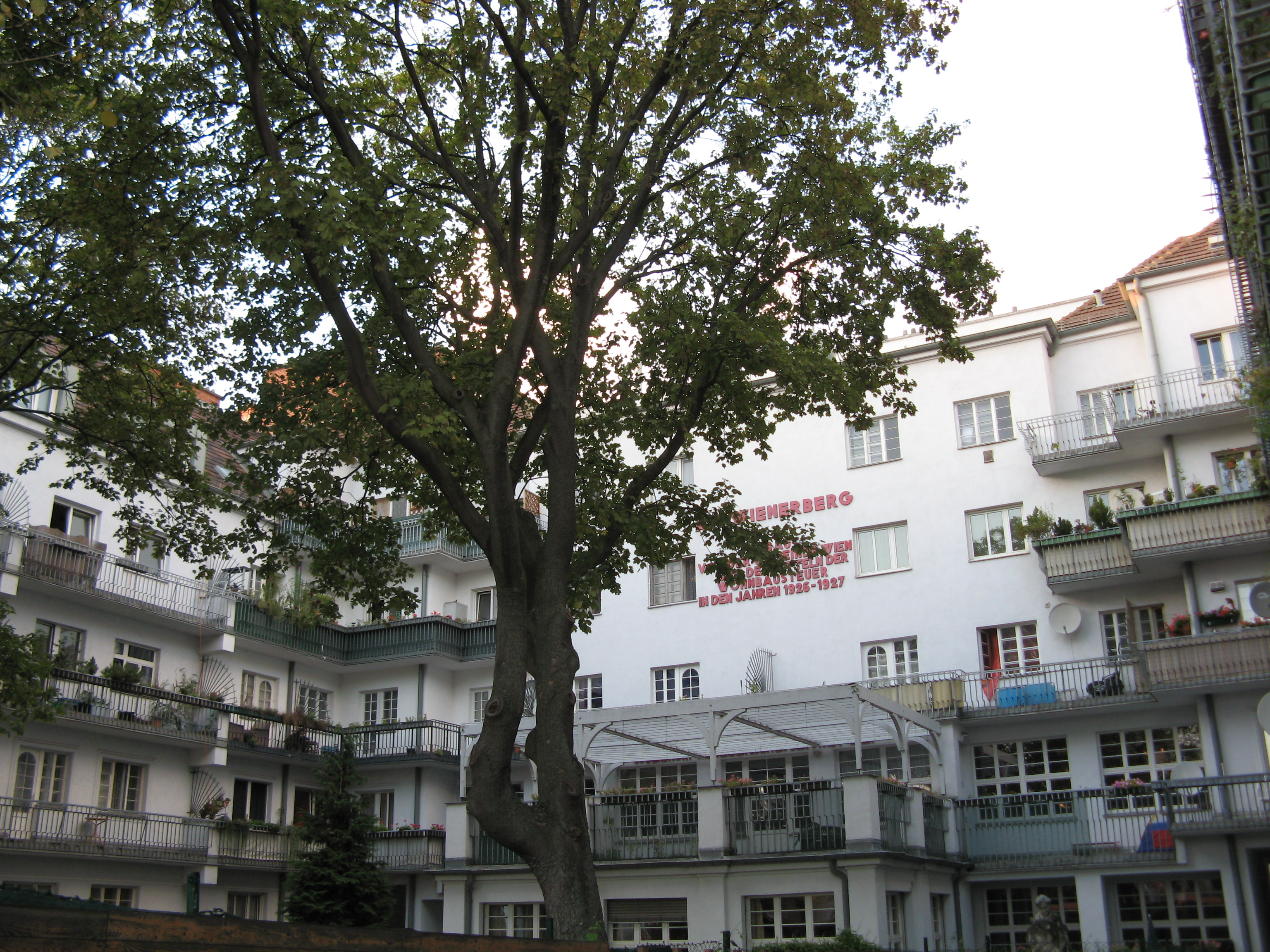 Wohnhausanlage Am Wienerberg, 1925-27, in Wien-Meidling